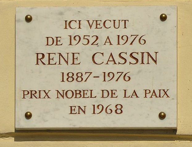 Plaque commémorative René Cassin apposée au 36 Quai de Béthune dans le 4e arrondissement de Paris sur l'ïle Saint-Louis où il habita de 1952 à 1976 .